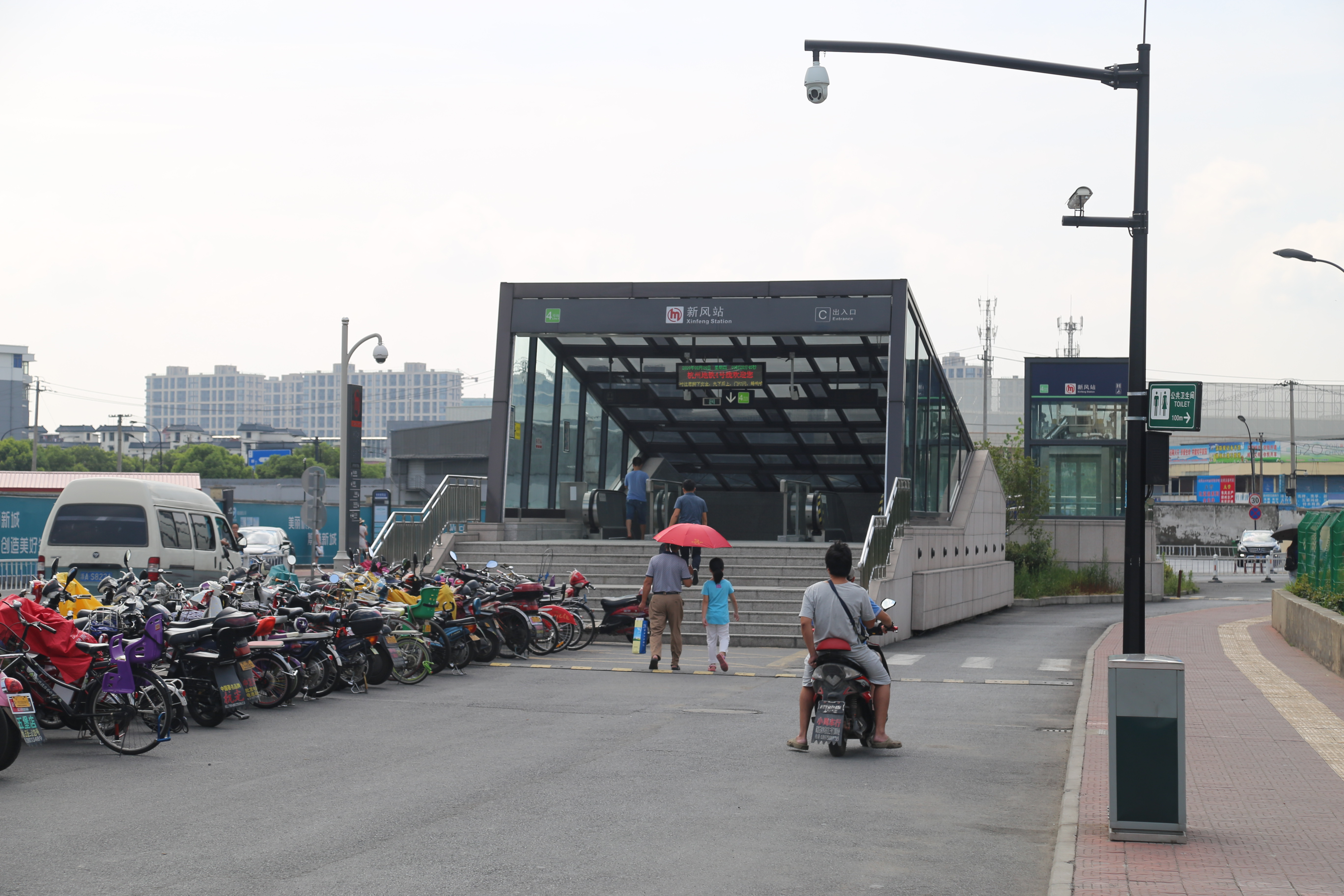 设在道路中央的新风站C出入口